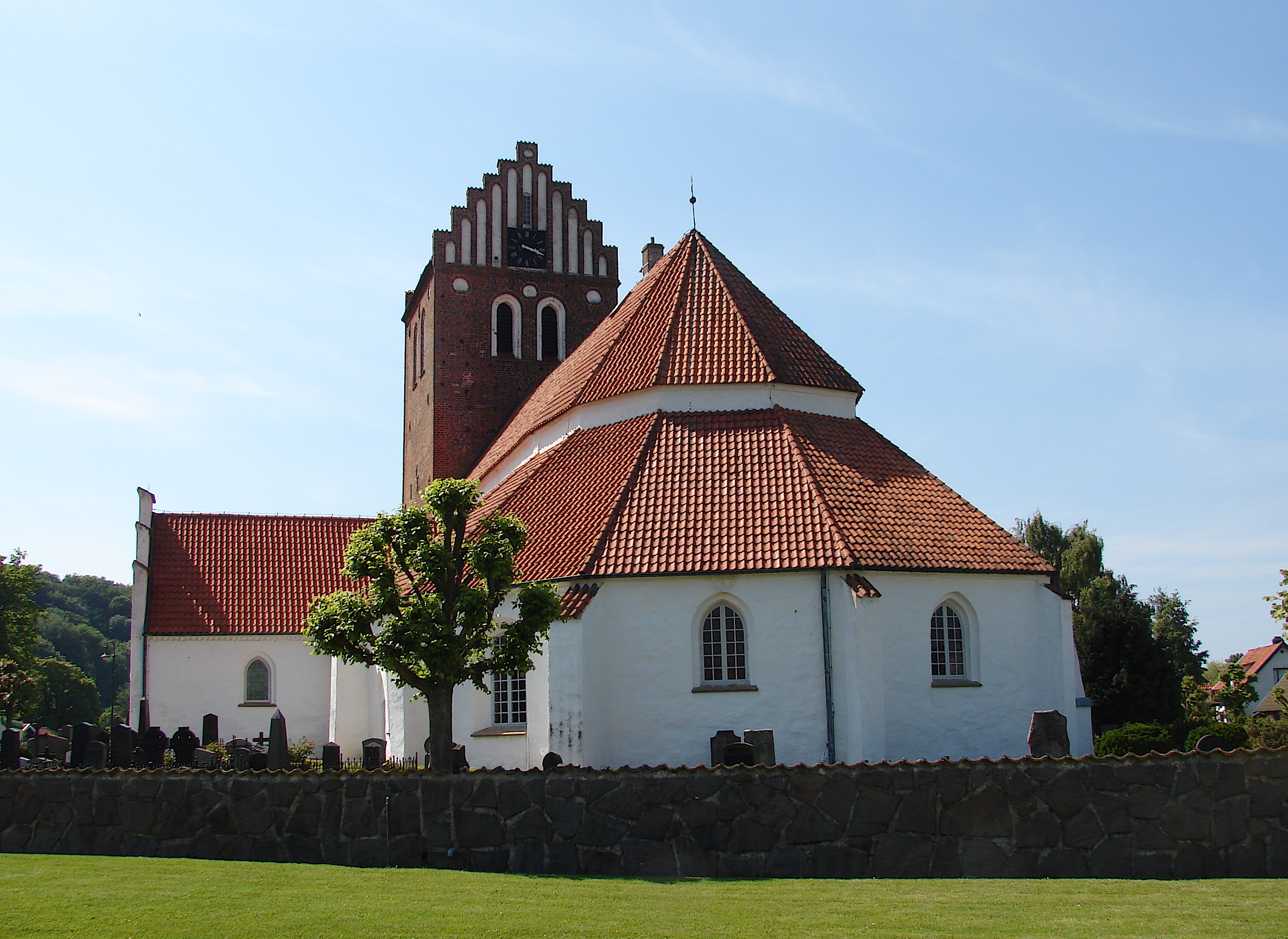 Båstad kirke, Bådsted